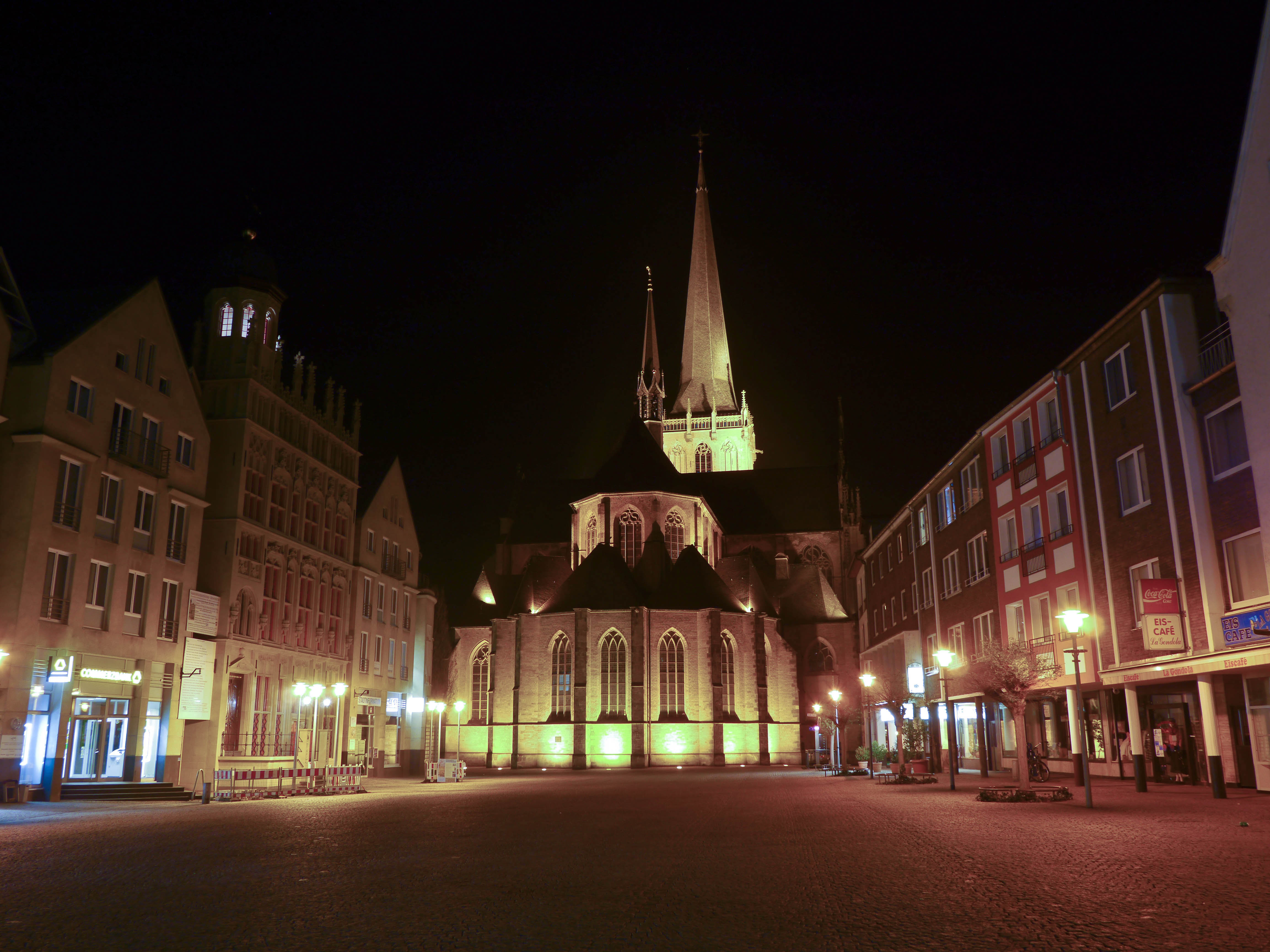 Willibrordikirche Wesel bei Nacht This is a photograph of an architectural monument.